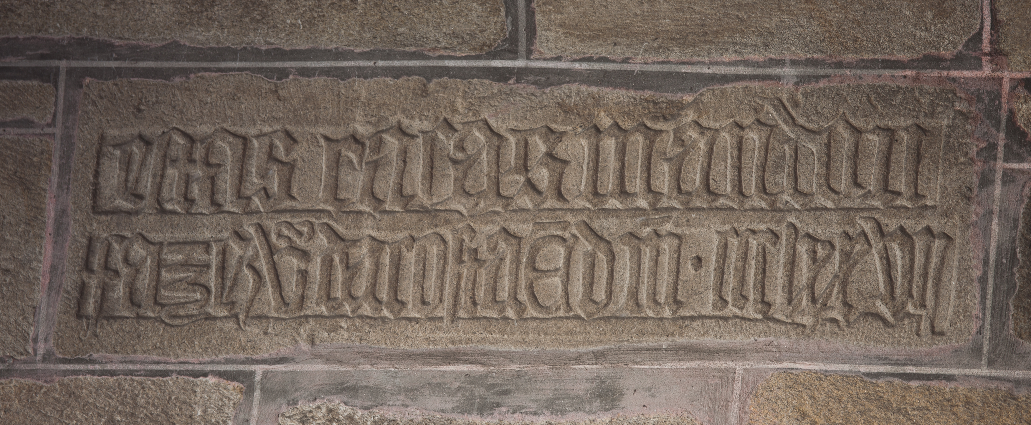 Texto nunha rúa de Noia, Galicia (Spain)